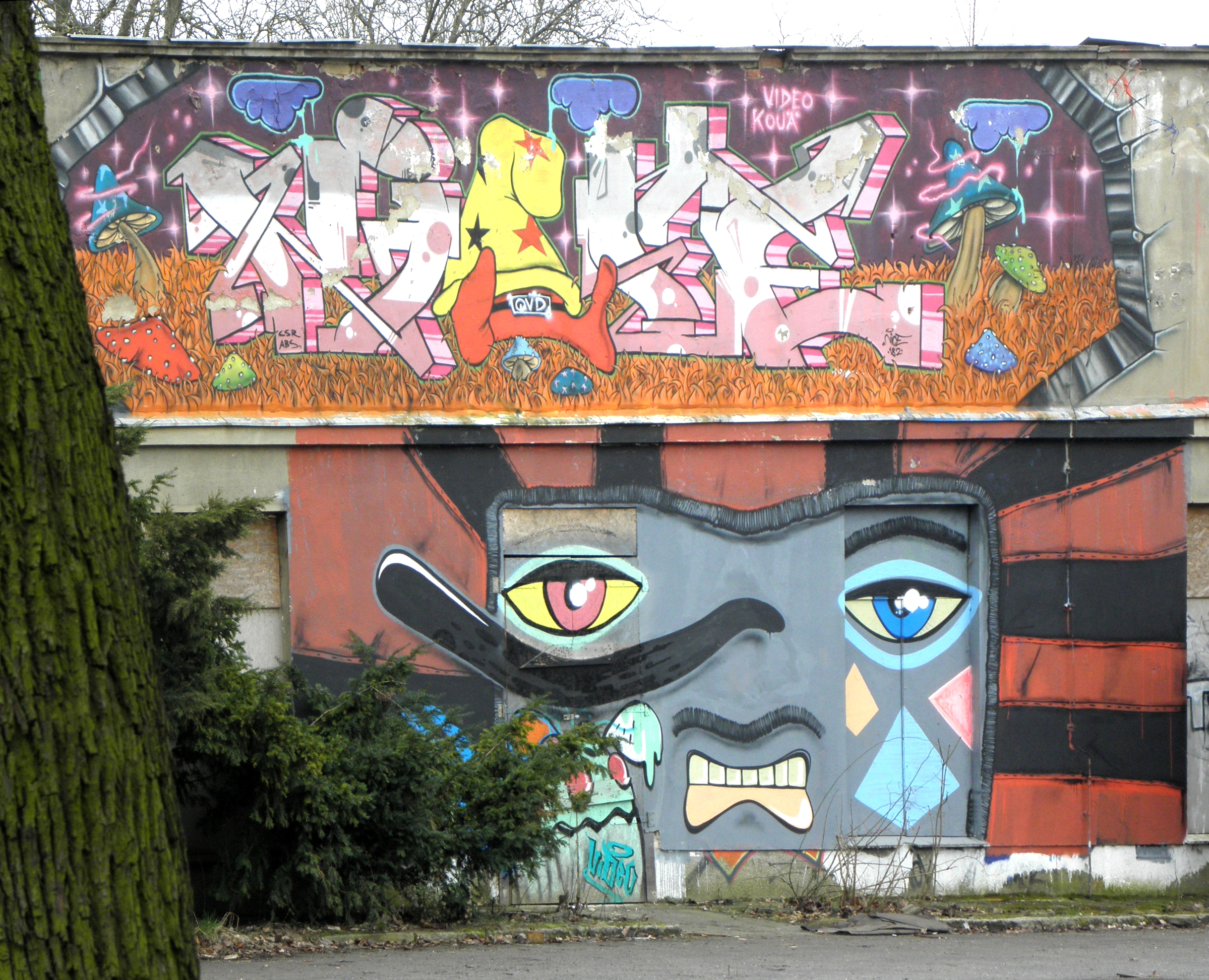 (Straße) An der Wuhlheide in Oberschöneweide: Mellowpark